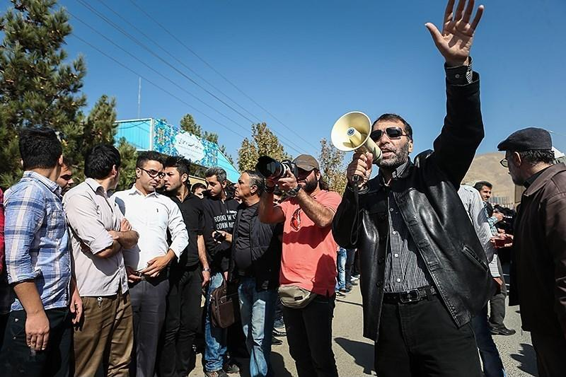 پشت صحنه فیلم و سریال معراجی ها